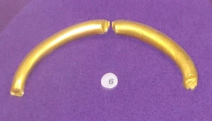 Colanul cu inscriptie runica